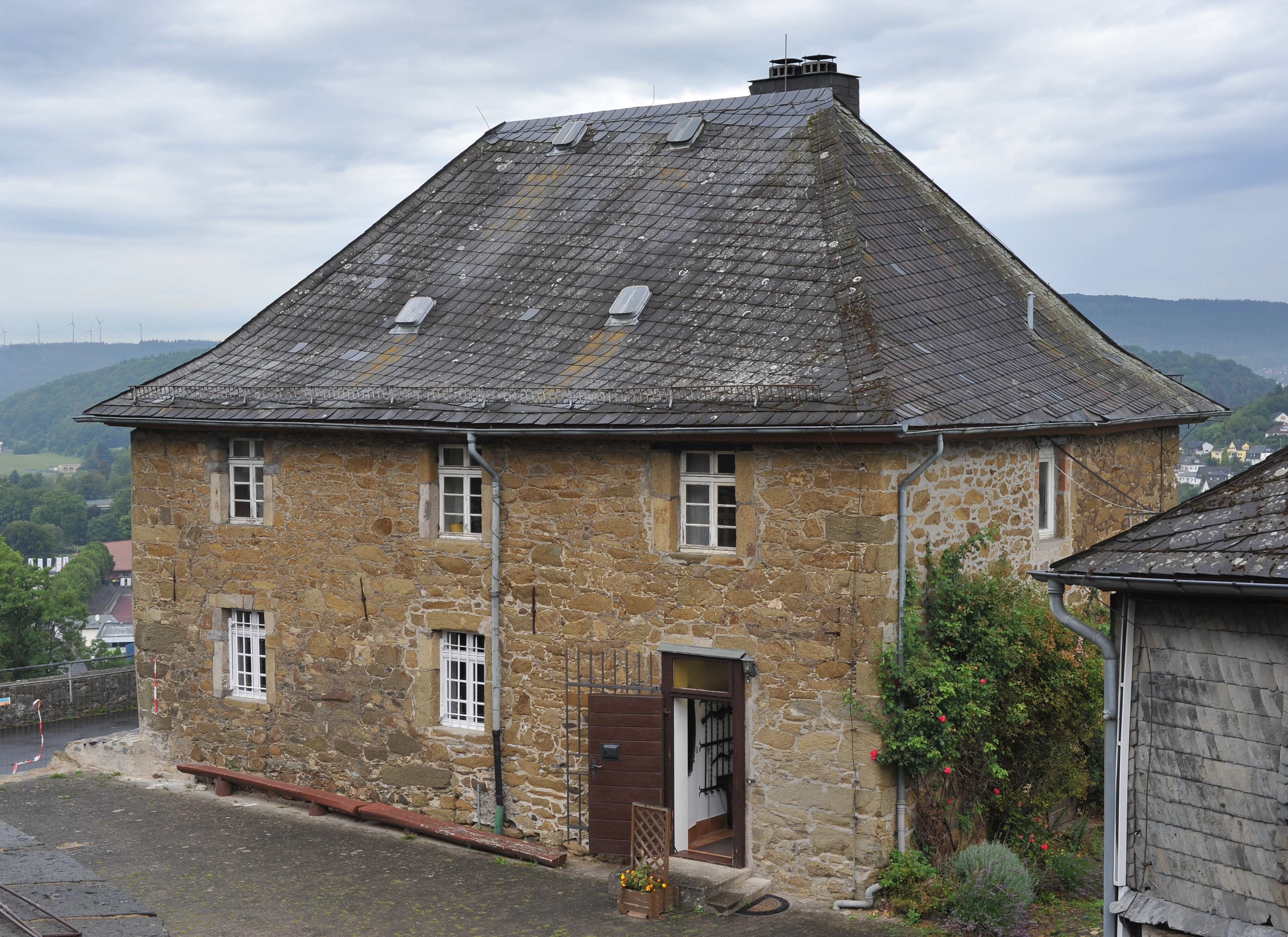 Stockhaus Dillenburg. Ehemaliges Gefängnis, am Fuße des Schlosses gelegen, mit Blick über die Stadt.